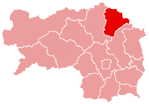 Karte: politischer Bezirk Mürzzuschlag Lizenz: GNU FDL Quelle: Zeichnung plp Datum: de:2004 Ort: Wien